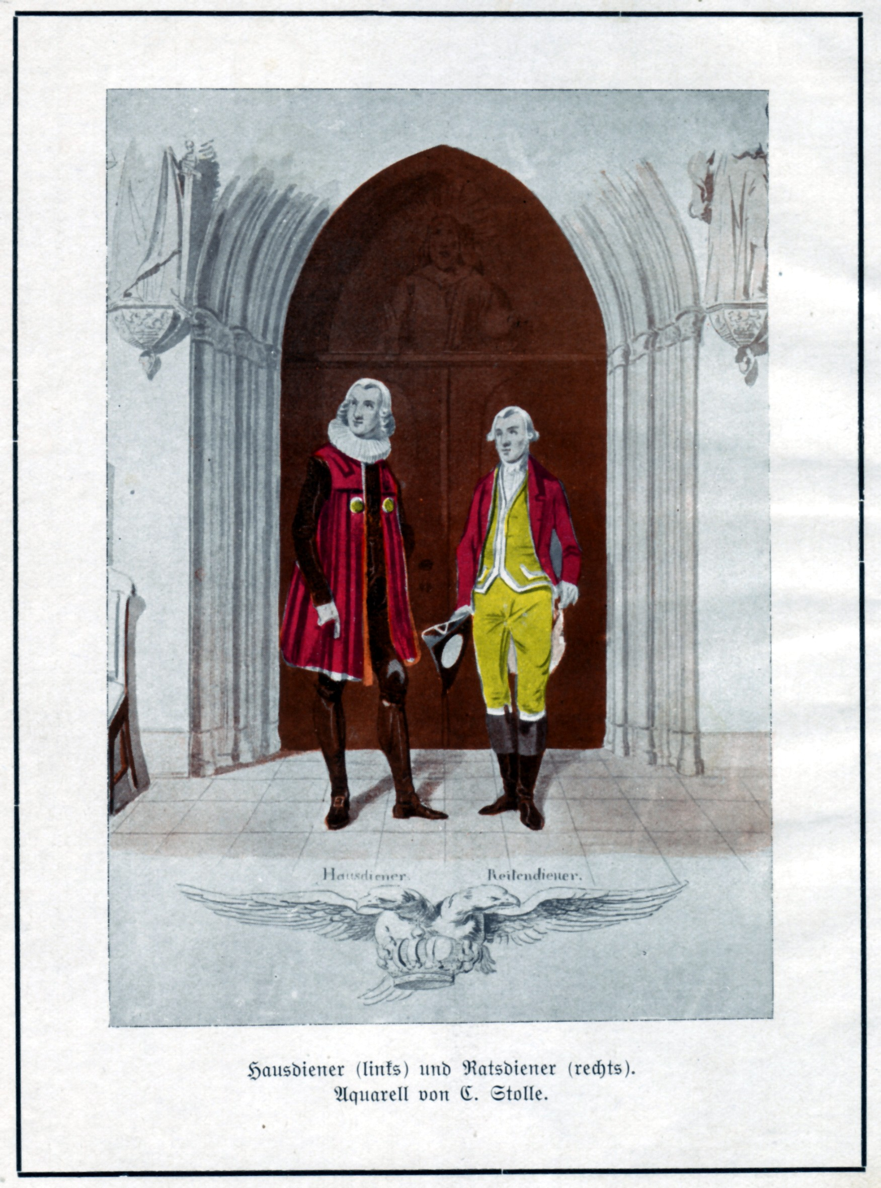 Lübecker Amtstrachten: Hausdiener (links) und Ratsdiener (rechts)